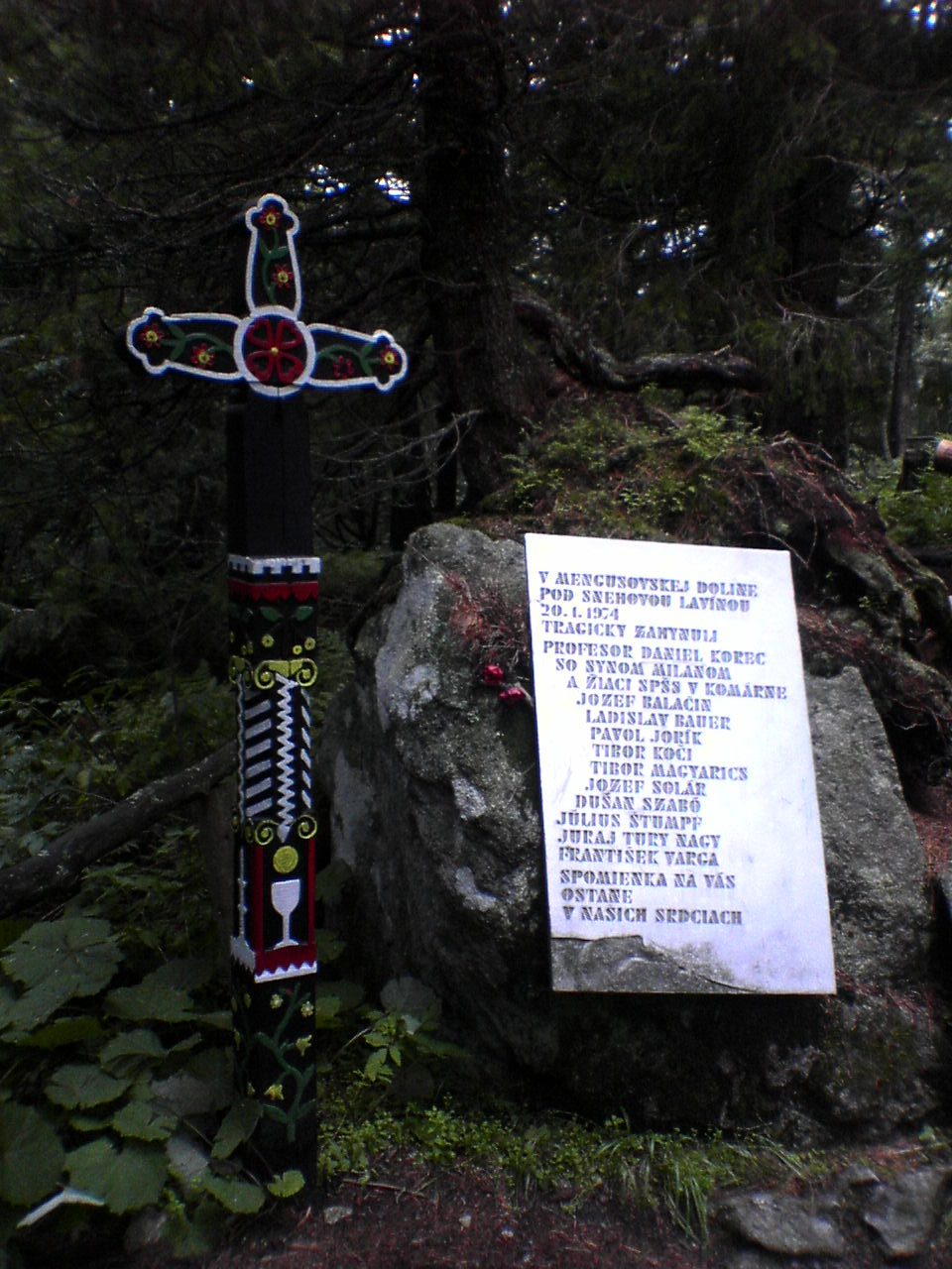 Symbolický cintorín4